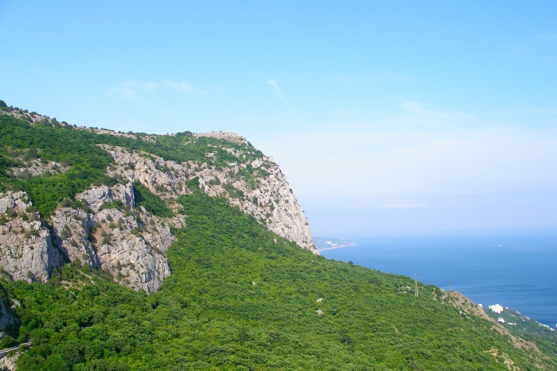 Crimea, Ukraine.